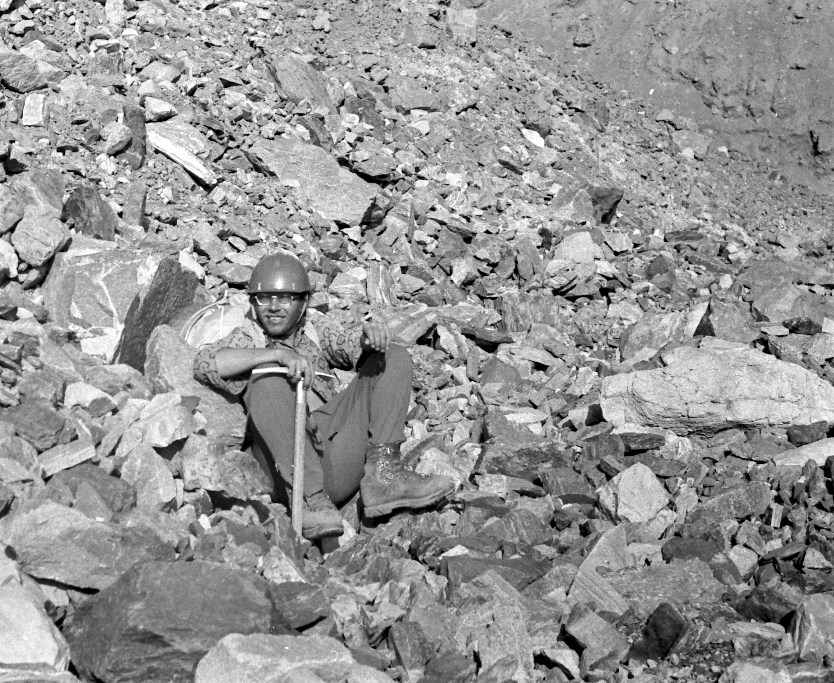 Ekspeditsioon mäetipule "Tartu Ülikool 350". Enn Saar.